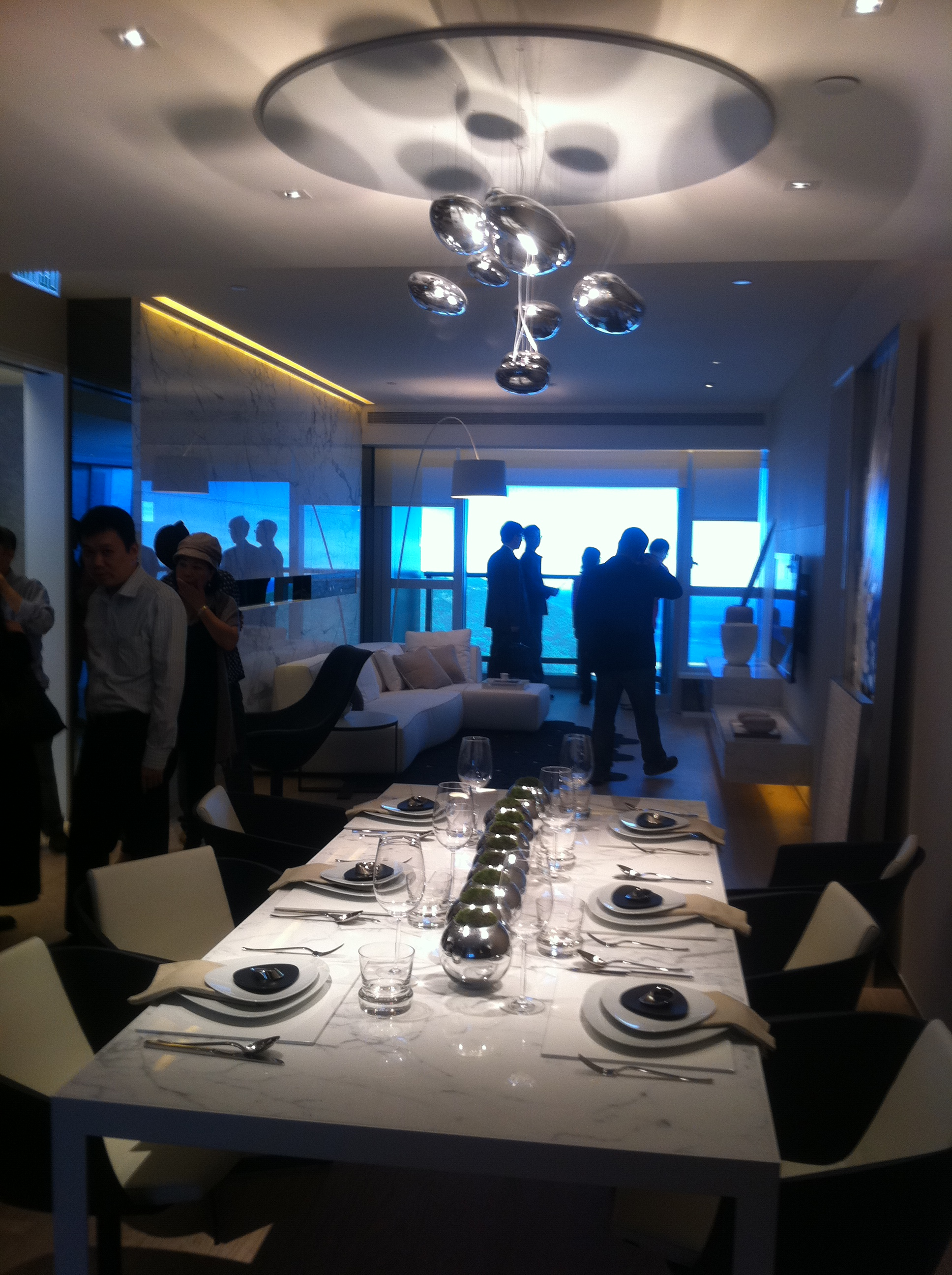 中文（香港）: 深灣9號zh:示範單位zh:飯廳